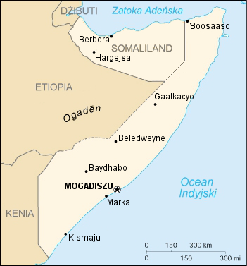 Mapka Somalii